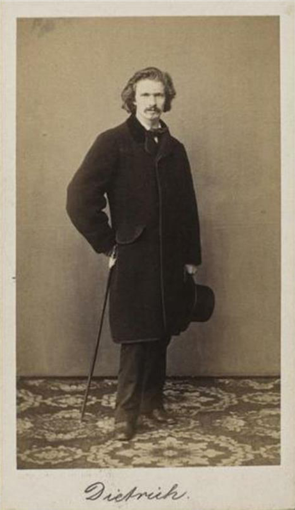 Fotografie von Anton Dietrich (1833–1904), Arnold Overbeck, Gebr. G. & A. Overbeck in Düsseldorf